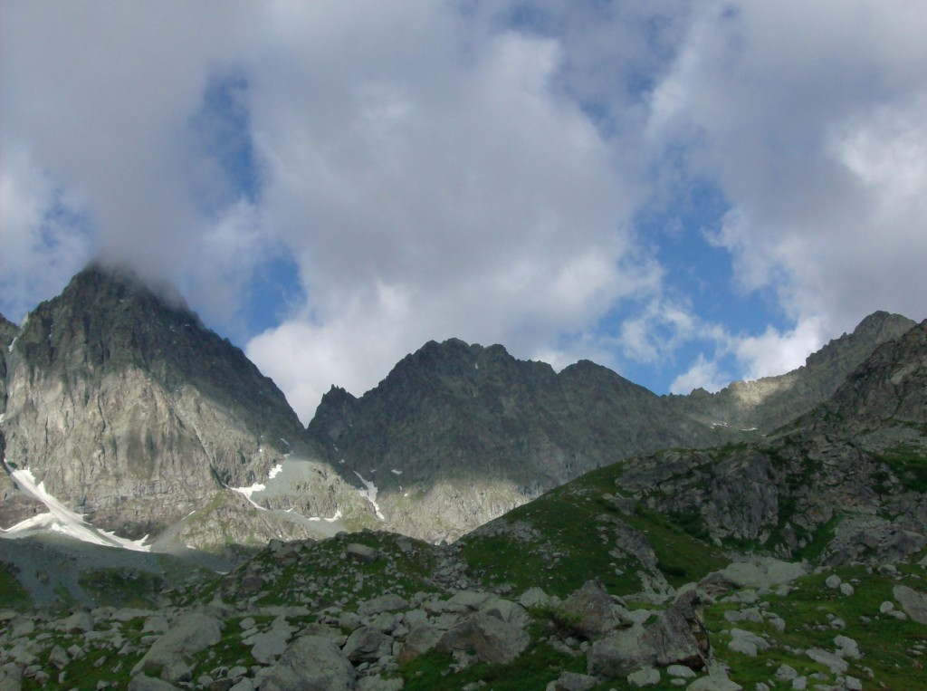 Punta Gastaldi (versante Est) vista dal Vallone dei Quarti, poco sotto il Lago Chiaretto